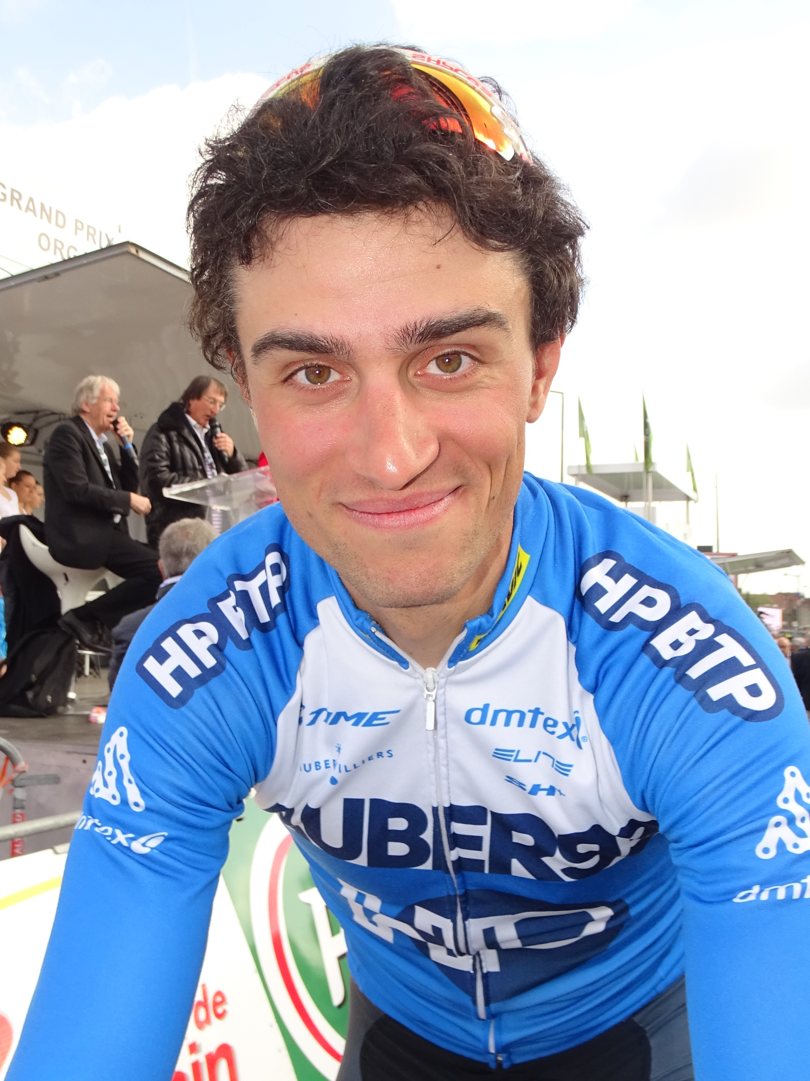 Reportage réalisé le jeudi 13 avril à l'occasion du départ et de l'arrivée du Grand Prix de Denain 2017 à Denain, Nord, Nord-Pas-de-Calais-Picardie, France.